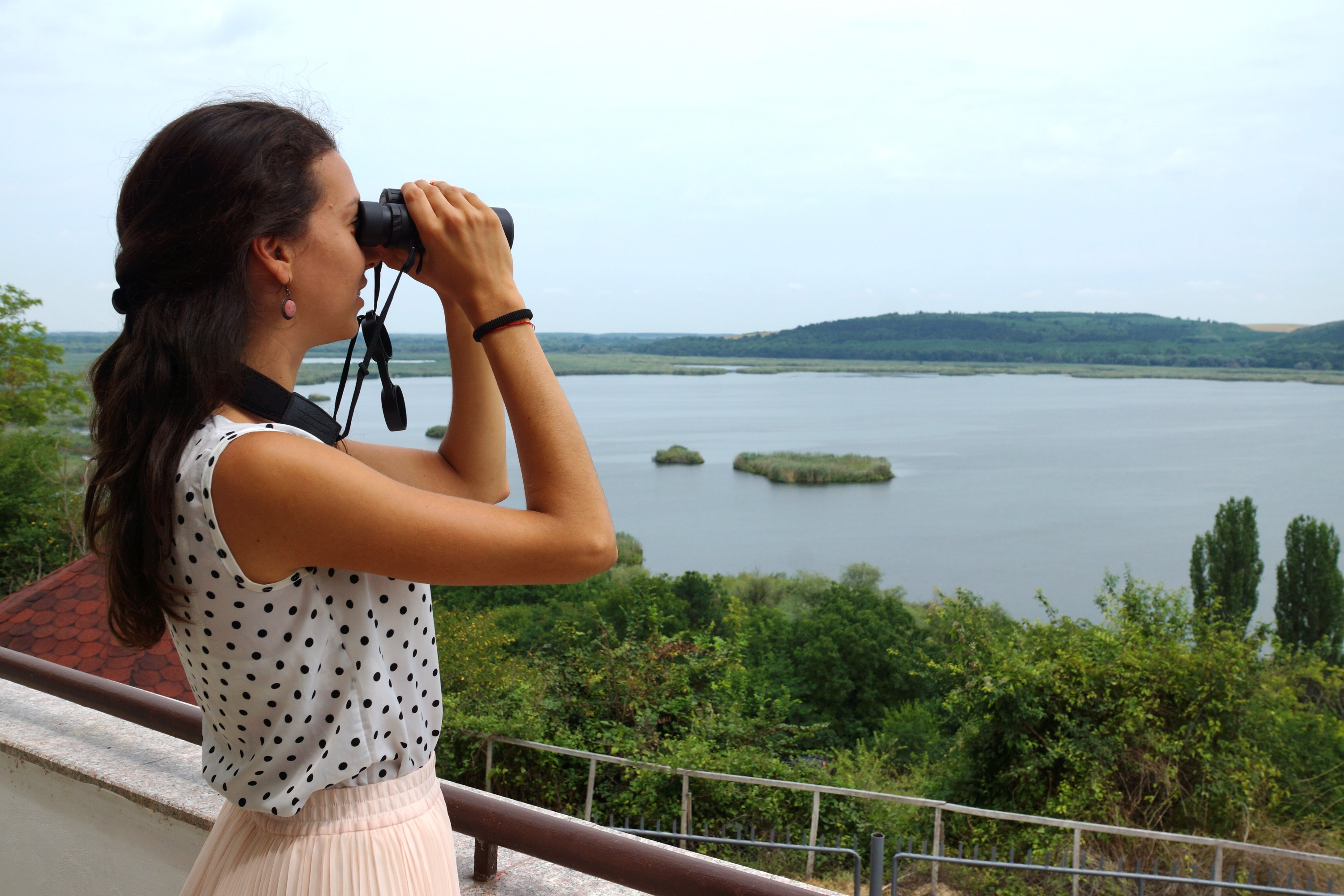 Изглед към Биосферен парк Сребърна